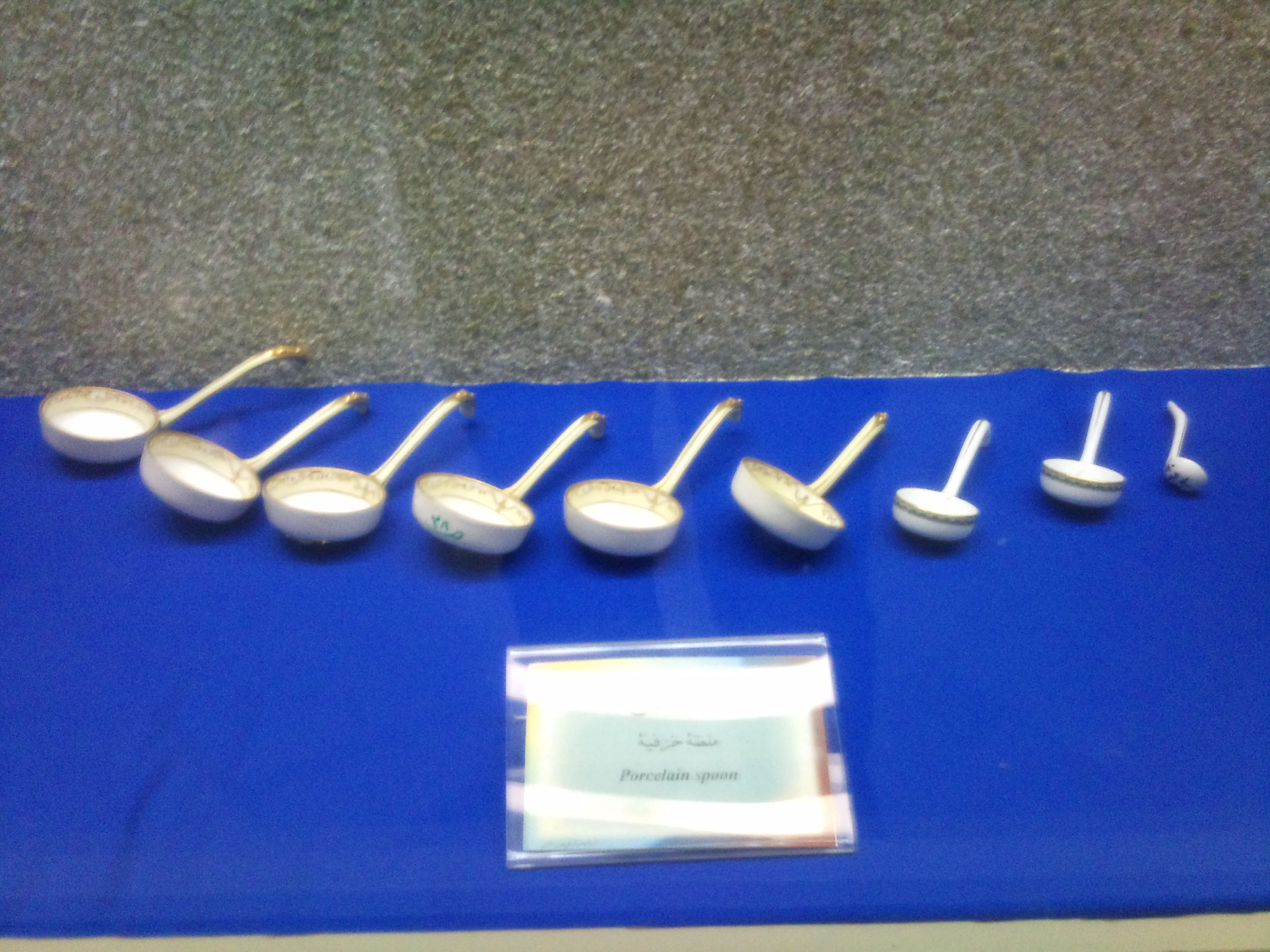 Mashhad museum